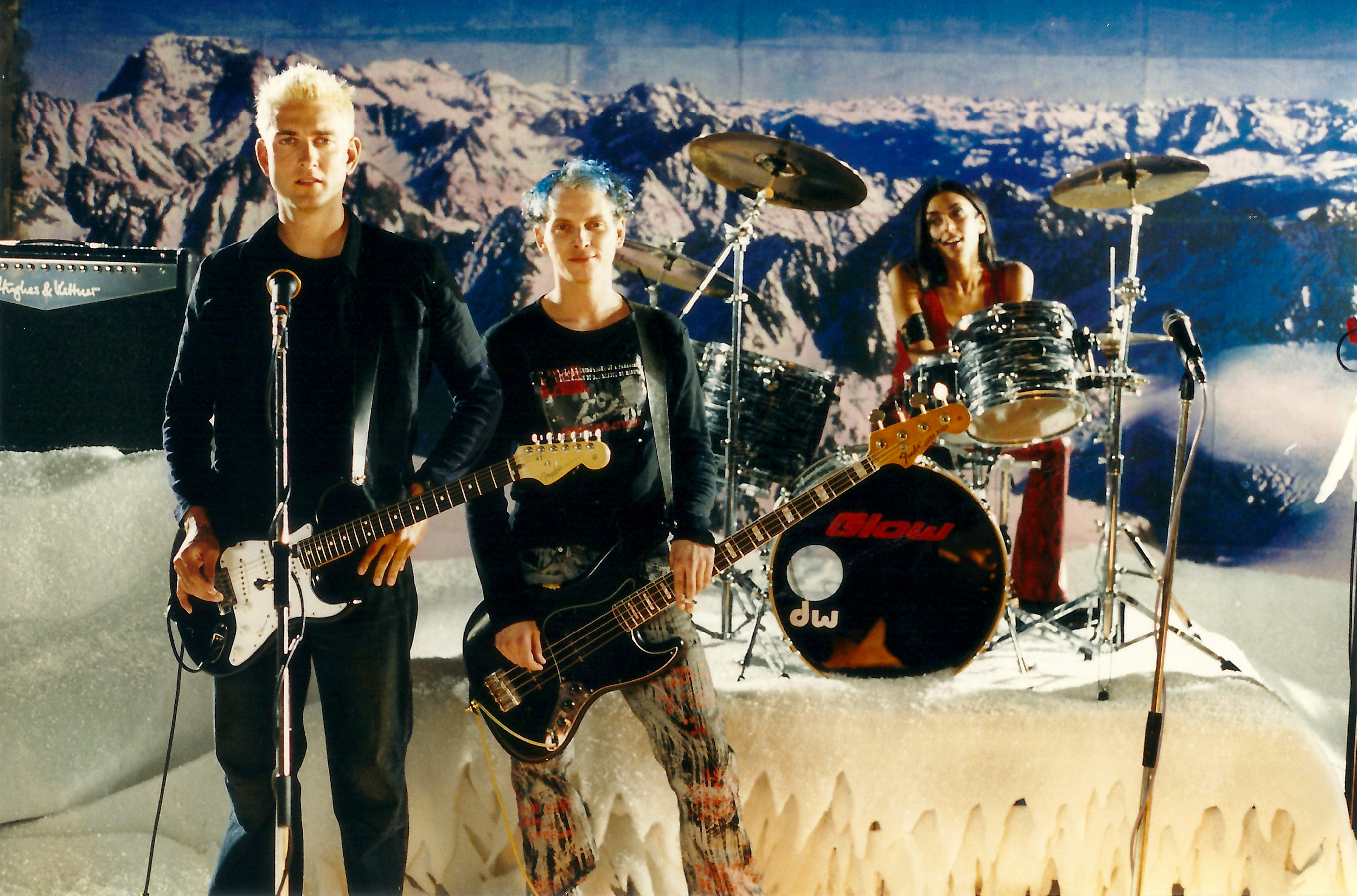 Videodreh des Songs President of Boarderland der Band GLOW im Jahre 2001